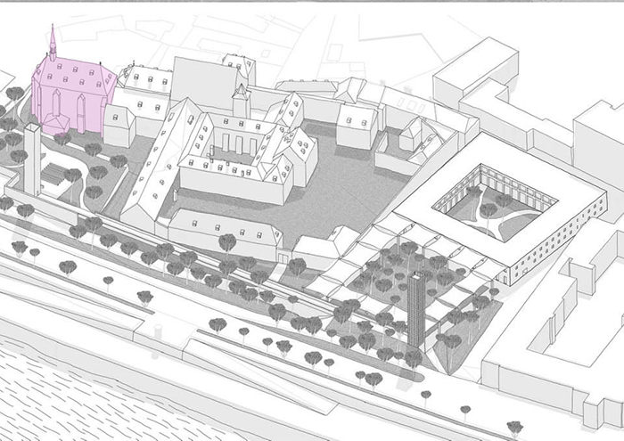 На картинке изображен костел Святого Сальвадора